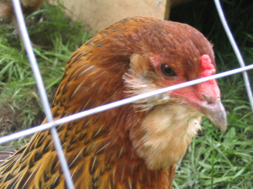 An Ameraucana hen.